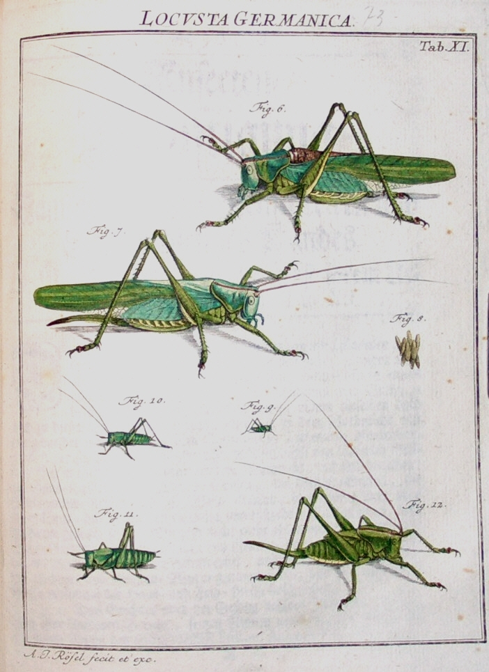 Die Methamorphose der Grünen Laubheuschrecke aus Insecten-Belustigung, (Band 1, Tafel 11) 1746